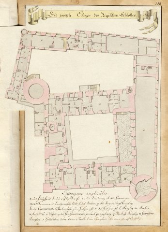 Scan from Johann Christoph Brotze's book Sammlung verschiedner Liefländischer Monumente. Die zweyte Etage des Rigischen Schloßes. 1767.